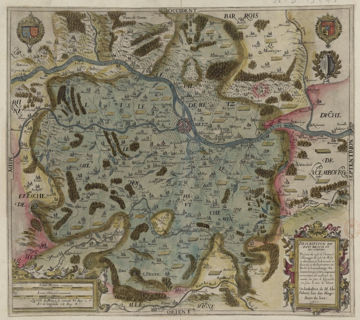 Description du pays messin et ses confins.